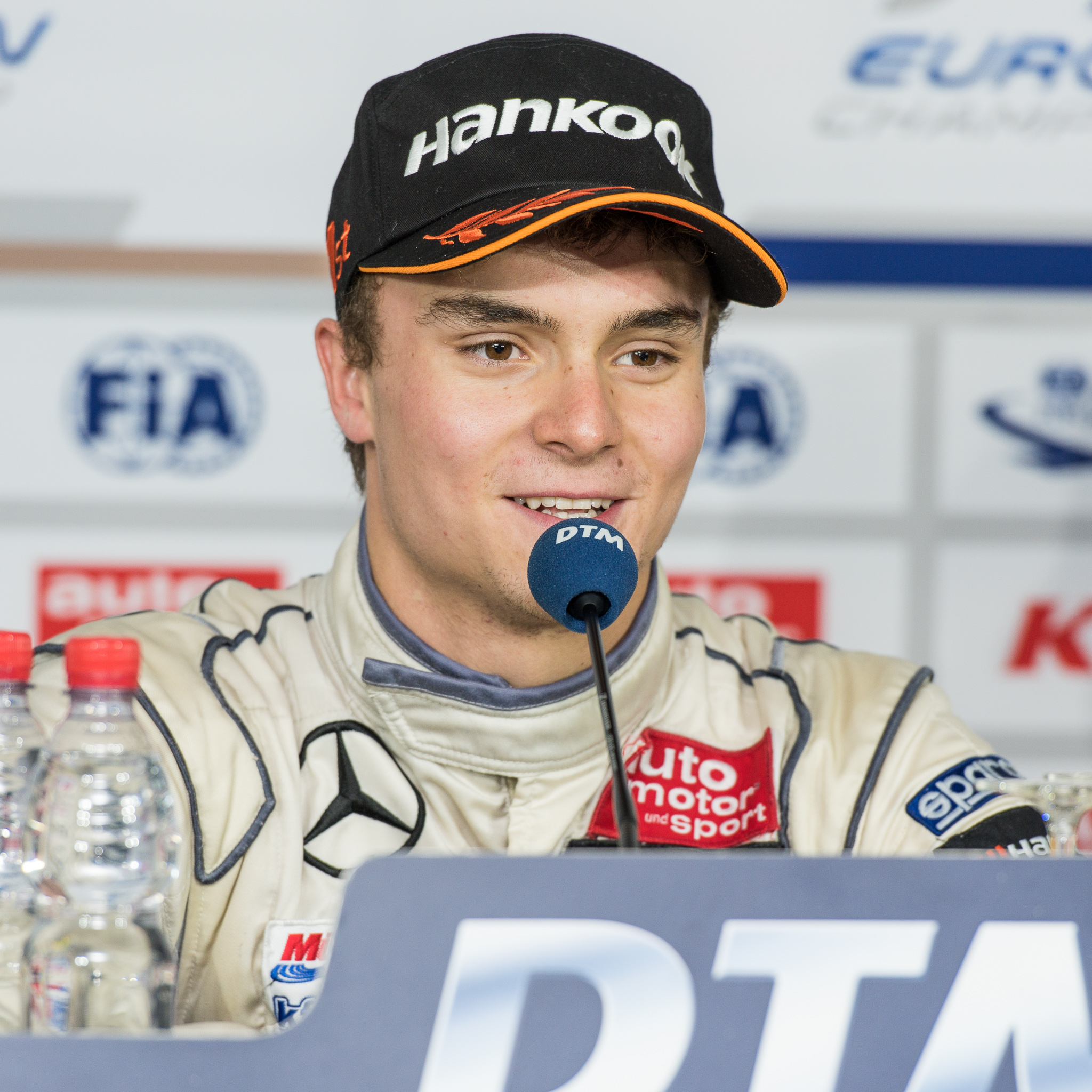 DTM,Deutsche Tourenwagen Masters,F3 FIA European Championship,FIA Formel 3 Europameisterschaft,Hockenheimring,Lucas Auer,Motorsport,Mücke Motorsport,Pressekonferenz,kfzteile24